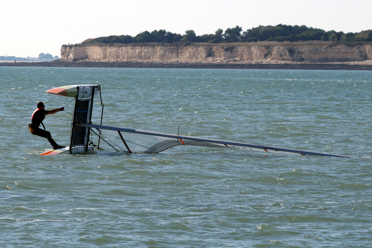 Déssalage dun catamaran à la Rochelle